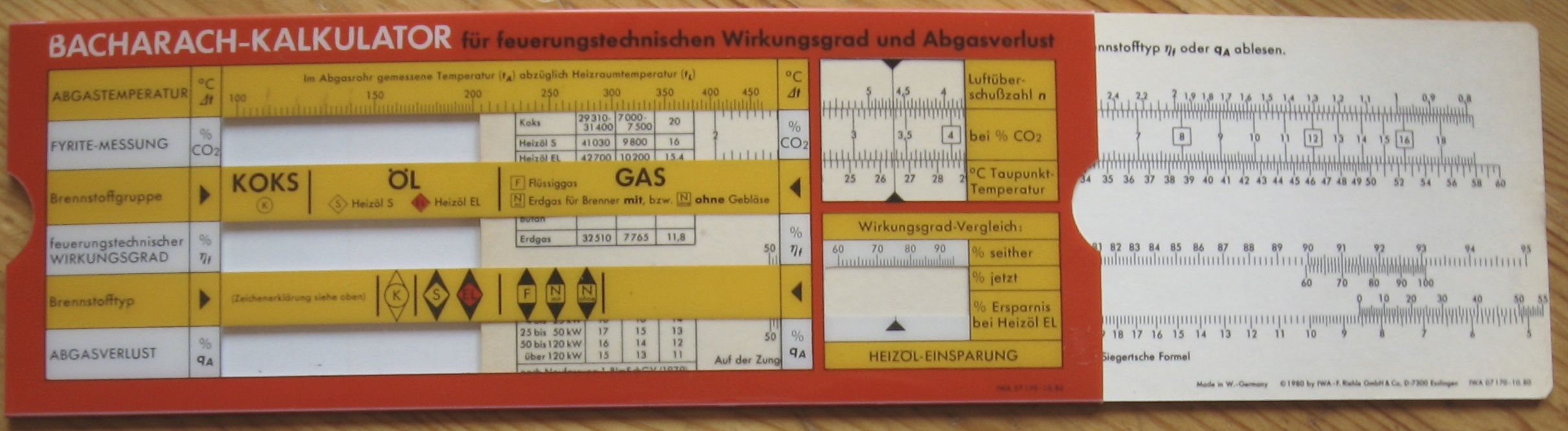 Datenschieber der Firma "Hans G. Werner + Co." Rohrbau "Bacharach Kalkulator für feuerungstechnischen Wirkungsgrad und Abgasverlust".